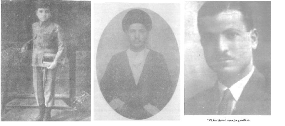 صور لثلاث مراحل من حياة حسن الأمين: الأولى إلى اليسار أيام دراسته في المدرسة العلوية، الثانية عند ذهابه إلى النجف بالعمامة، والثالثة يوم تخرجه من كلية الحقوق